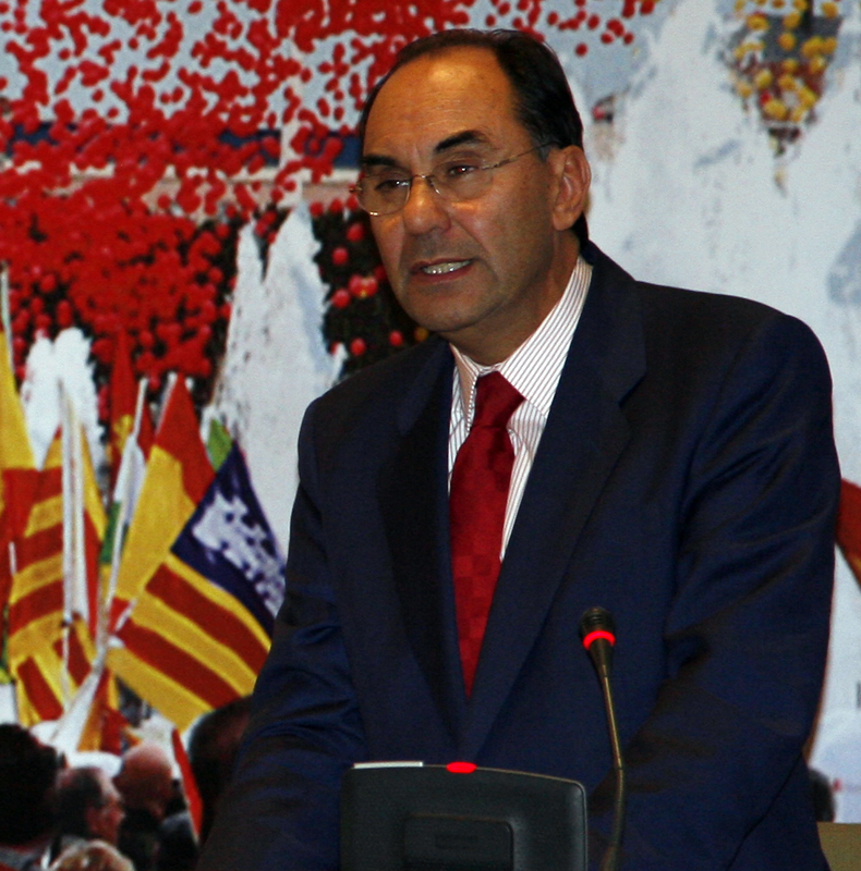 Aleix Vidal-Quadras